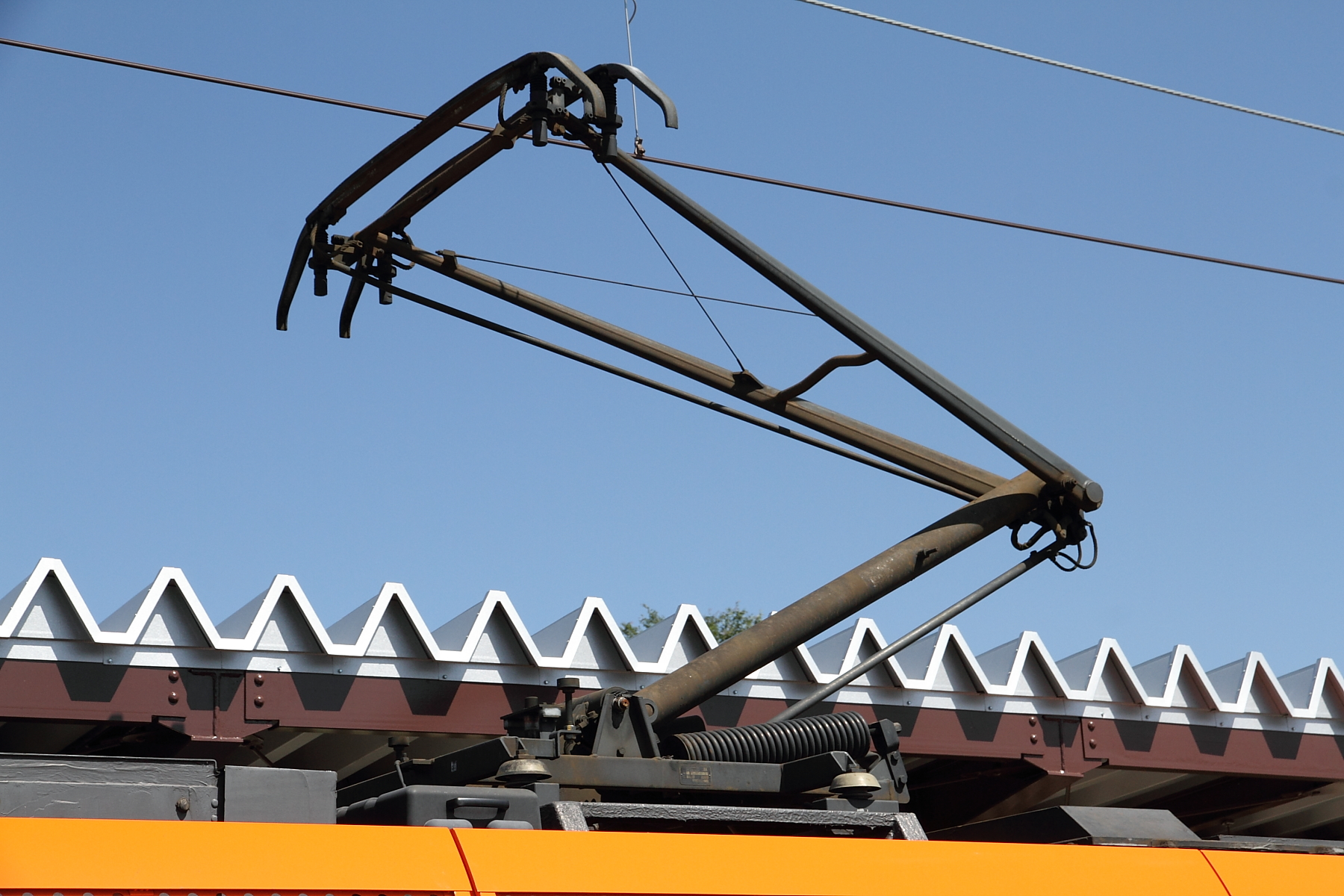 福井鉄道F1000形 (F1001) のパンタグラフ